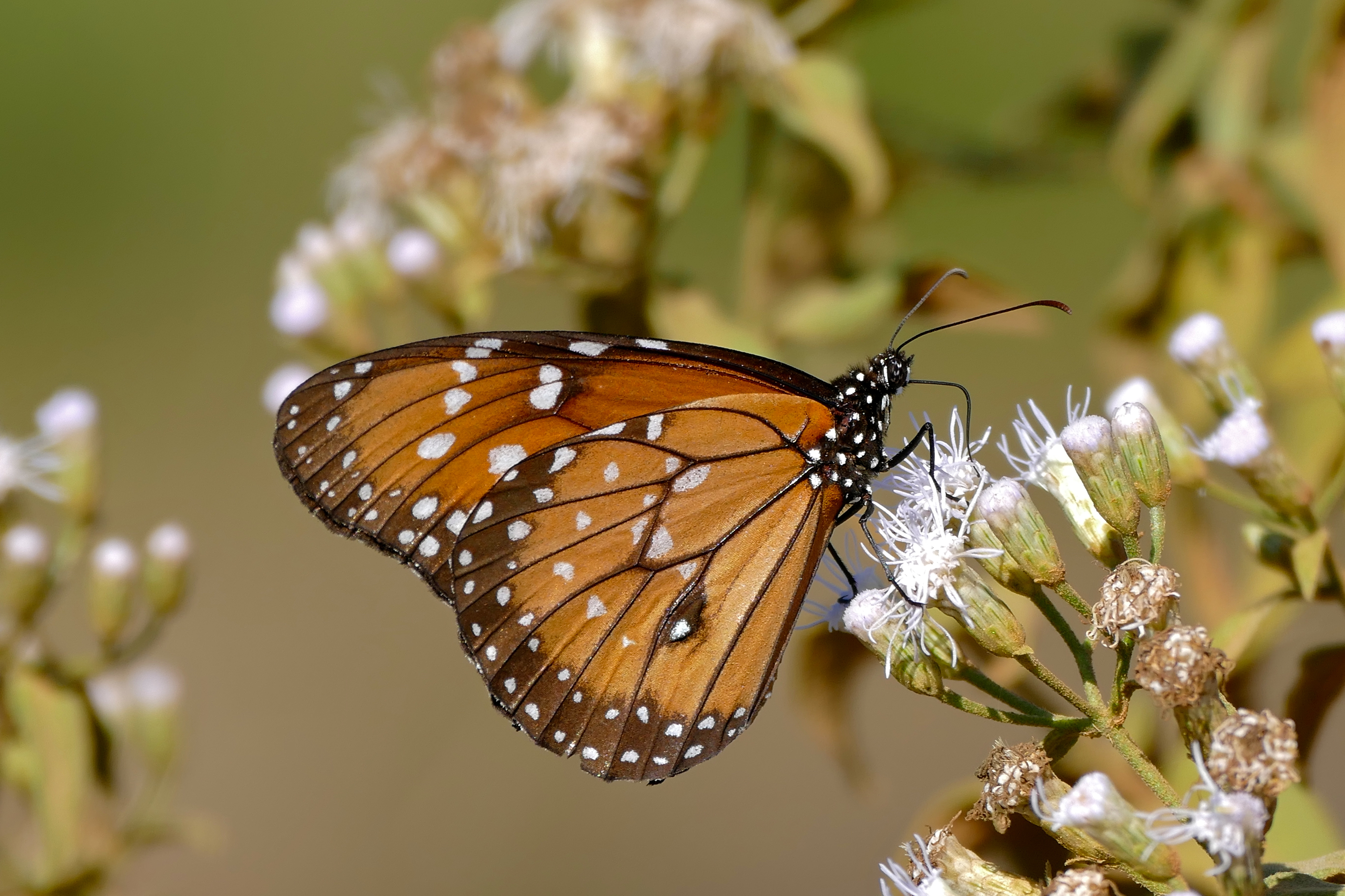 Transpantaneira, Poconé, Mato Grosso, BRAZIL